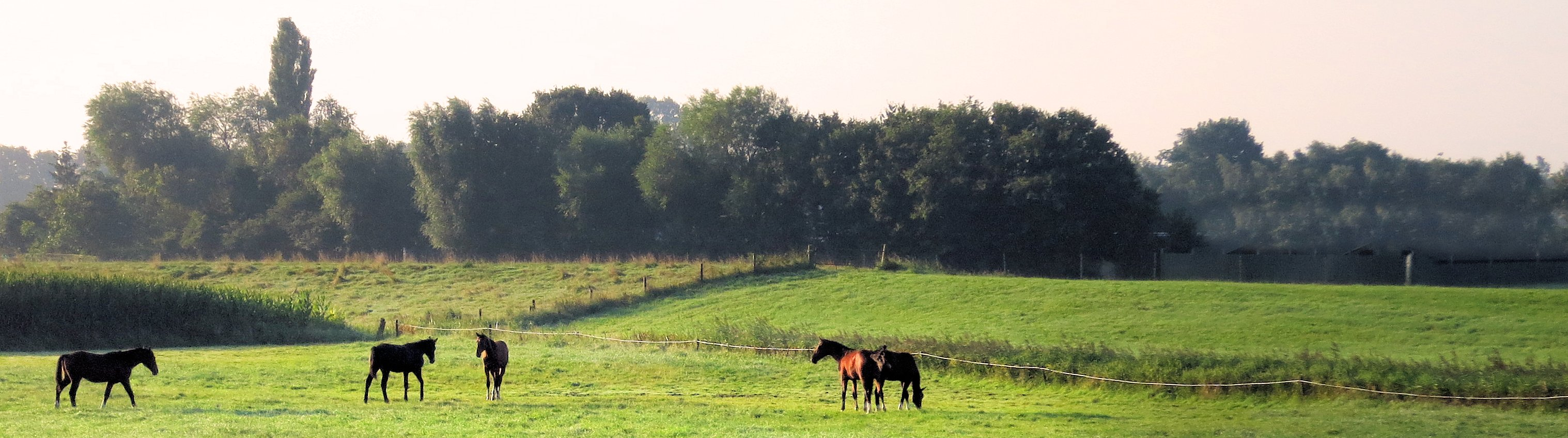 Day 221